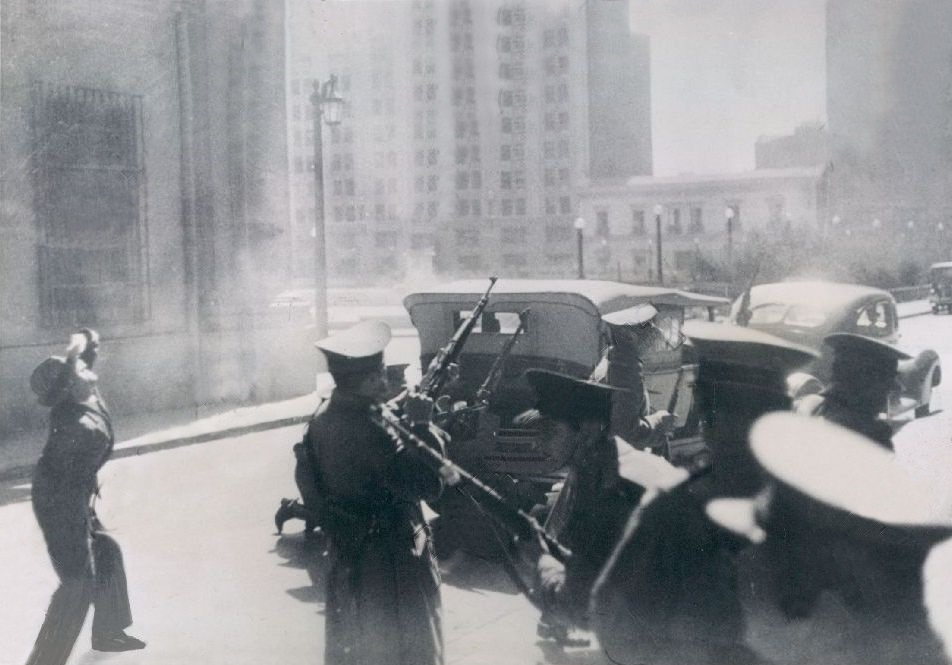 Las ametralladoras de los carabineros rompen fuego contra los asaltantes de la Caja de Seguro. Este hecho terminaria en la "matanza del Seguro Obrero" (5 de septiembre de 1938).